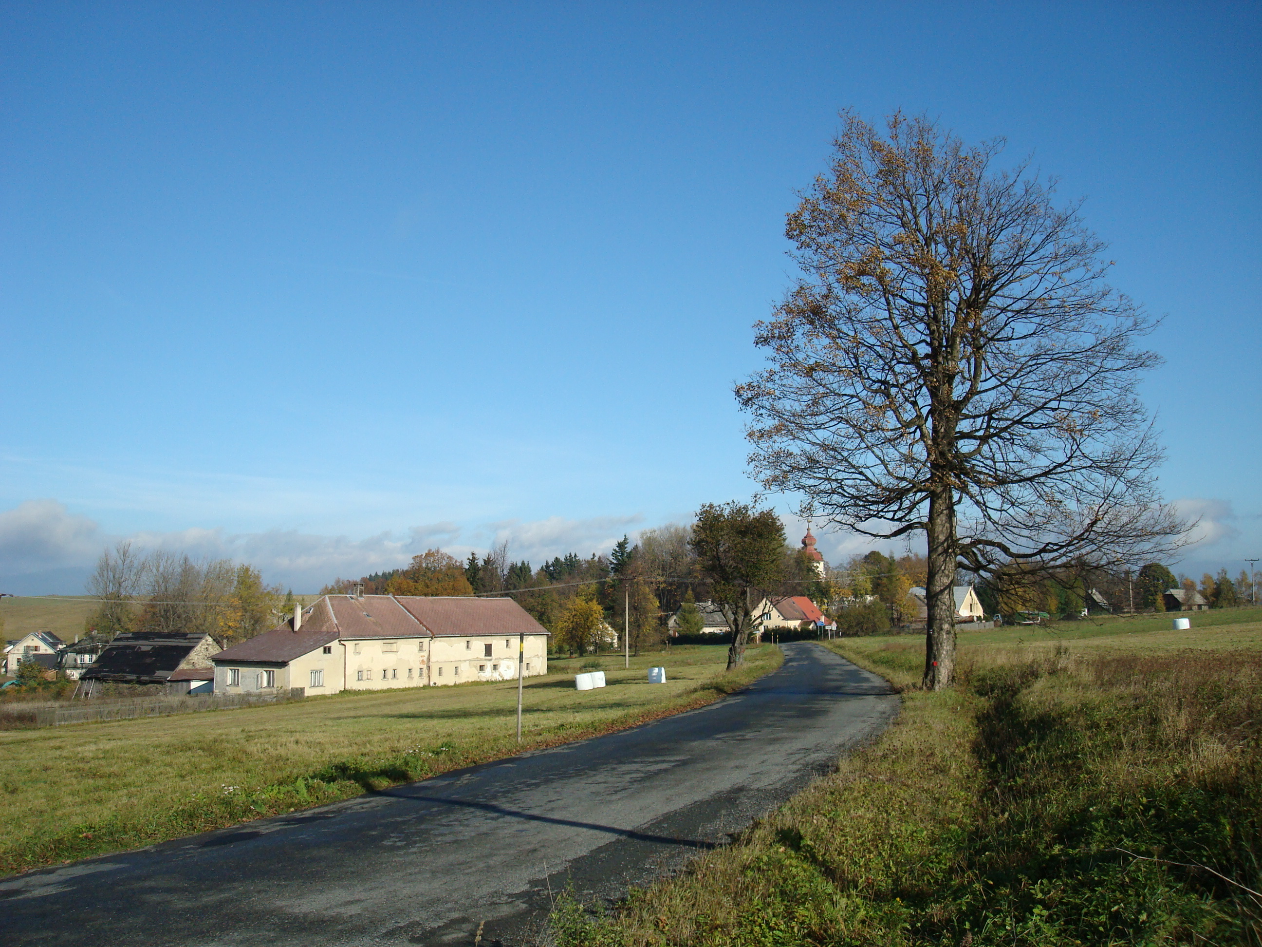 Stránské